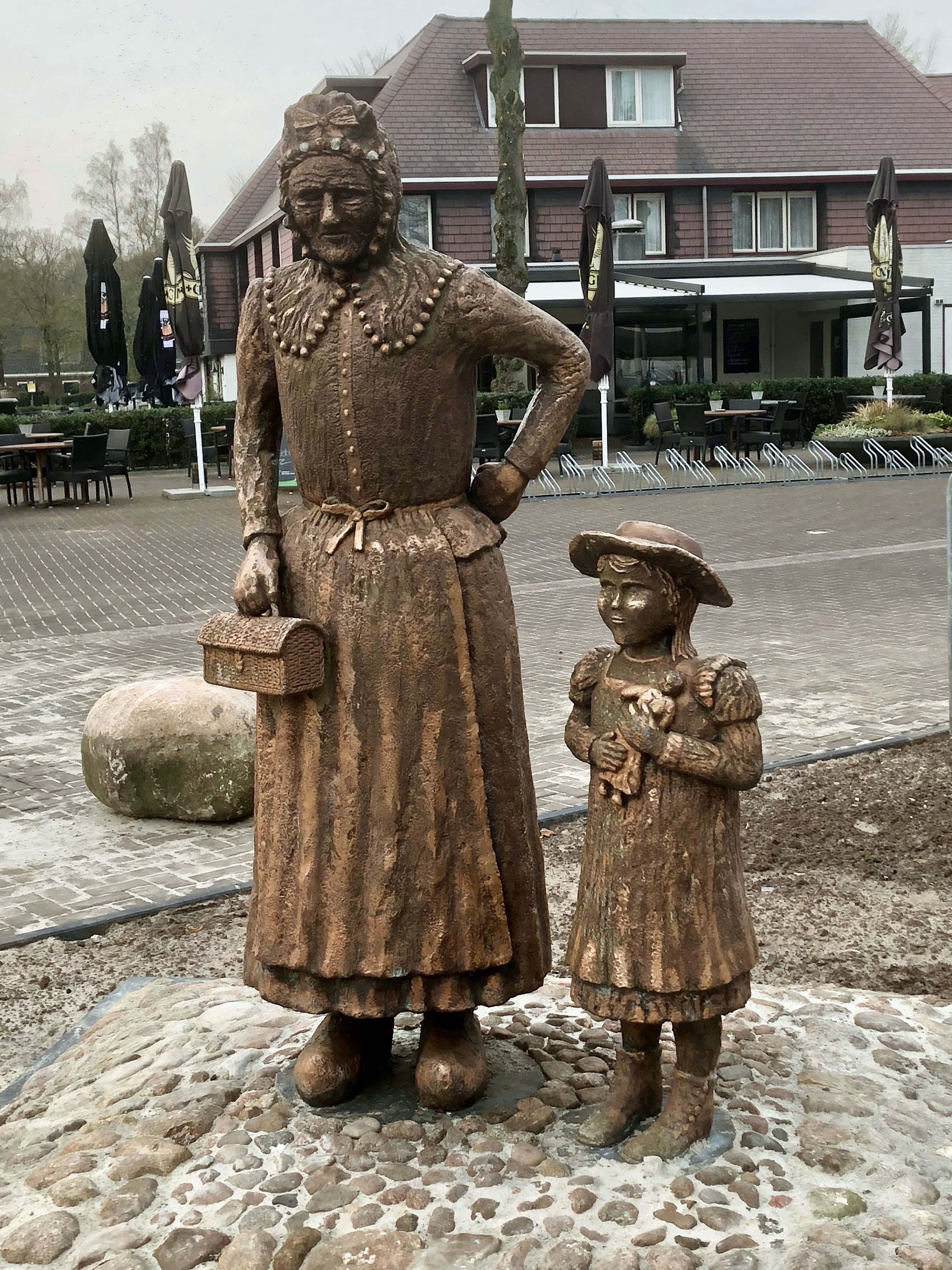 Otie en haar kleinkind door Gerrit Santing